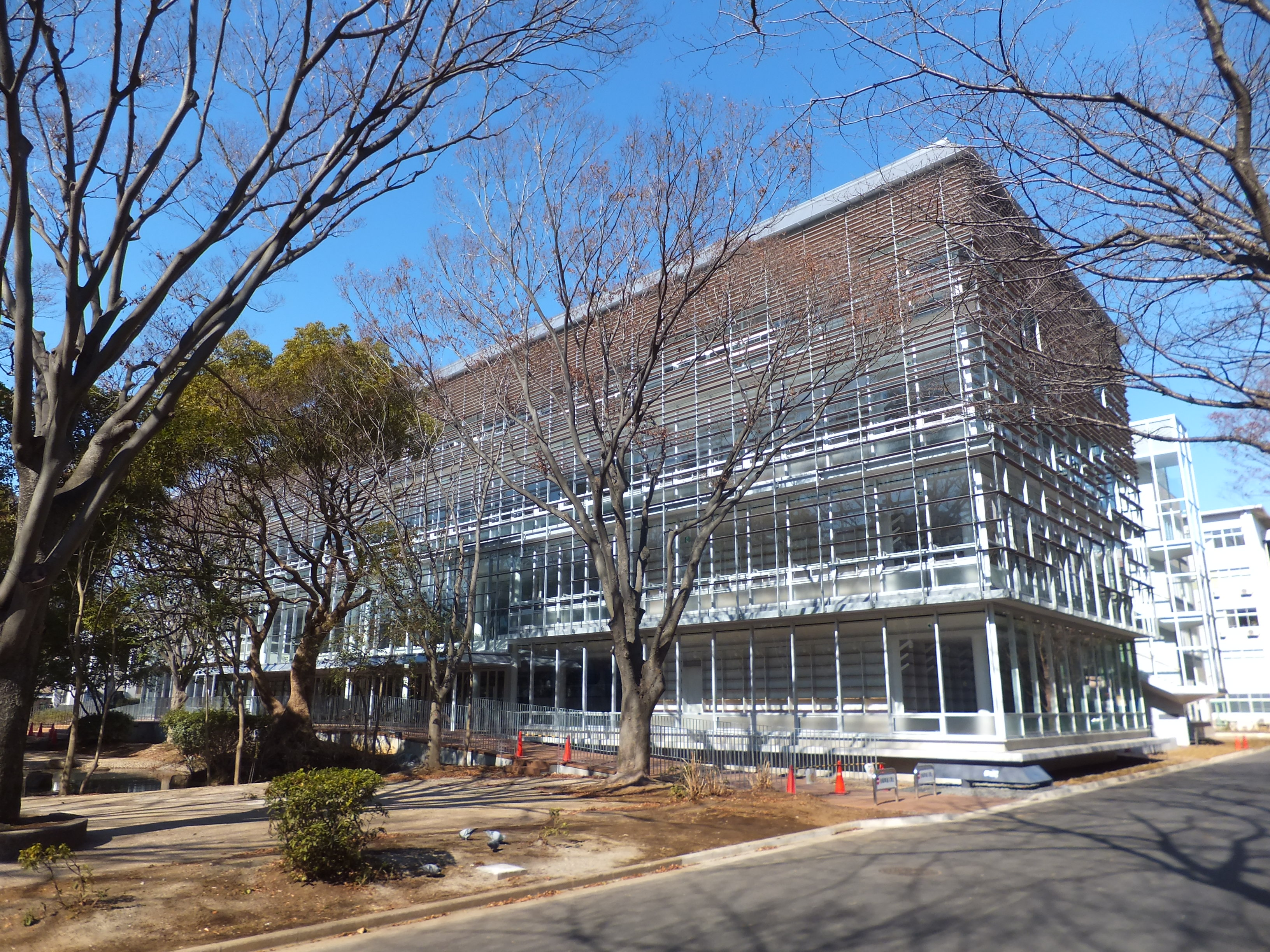 千葉大学附属図書館、N棟。従前の本館（K棟）外周に増築された棟。